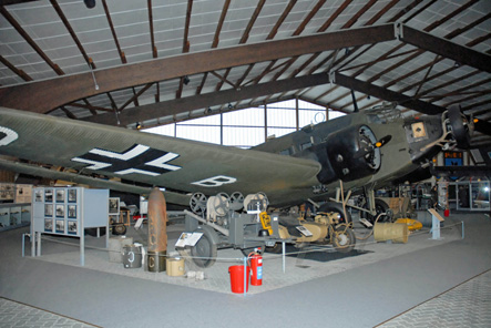 Ju 52 Museum der Traditionsgemeinschaft Lufttransport Wunstorf e.V. - Junkers Ju52 in der Museumshalle